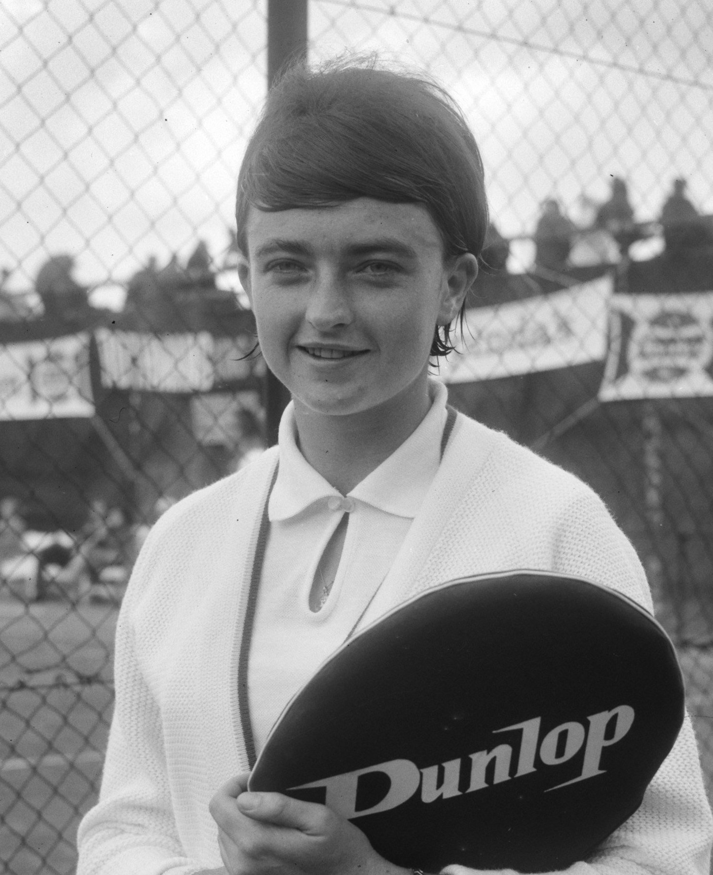 Tennis te Santpoort, de winnares finale damesenkel Pat Walkden (Rhodesië)